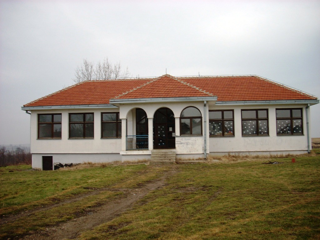 Plavce, Bojnik. Mesna zajednica i škola.